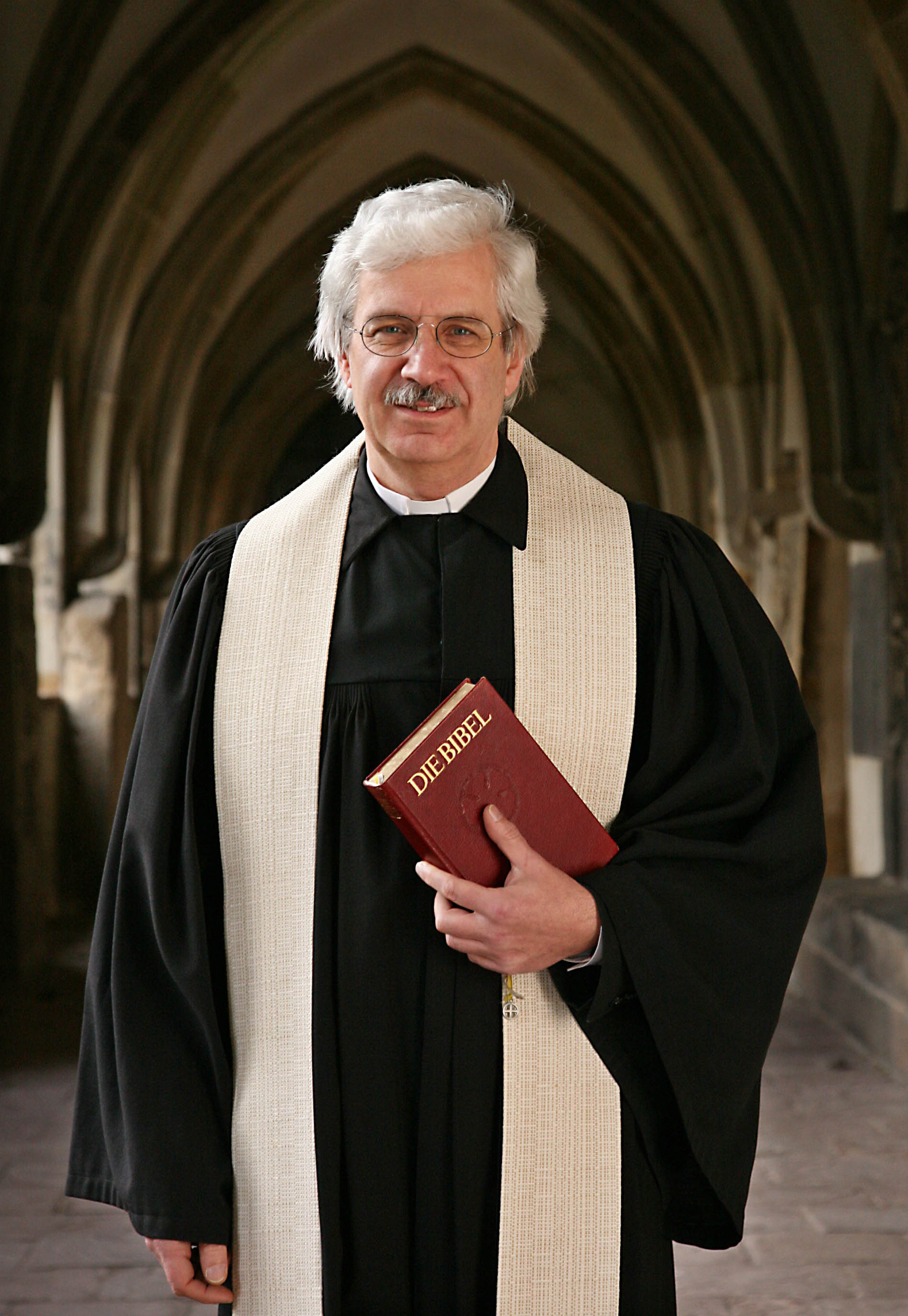 Domprediger Giselher Quast im Kreuzgang des Magdeburger Domes.